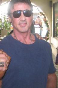 Foto amatoriale con Sylvester Stallone in posa